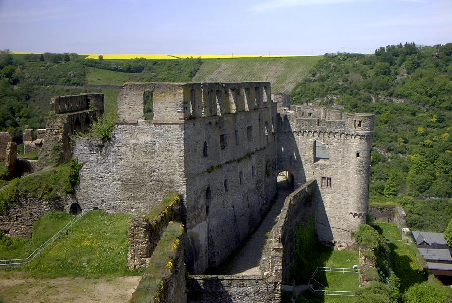 Burg Rheinfels